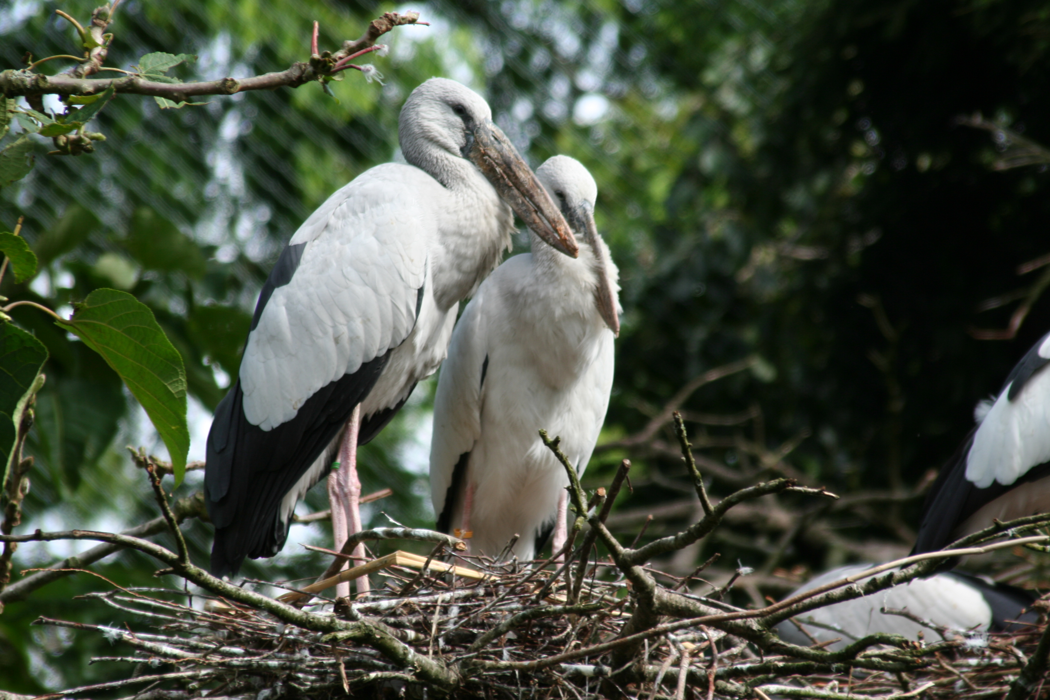 Anastomus oscitans, Vogelpark Walsrode